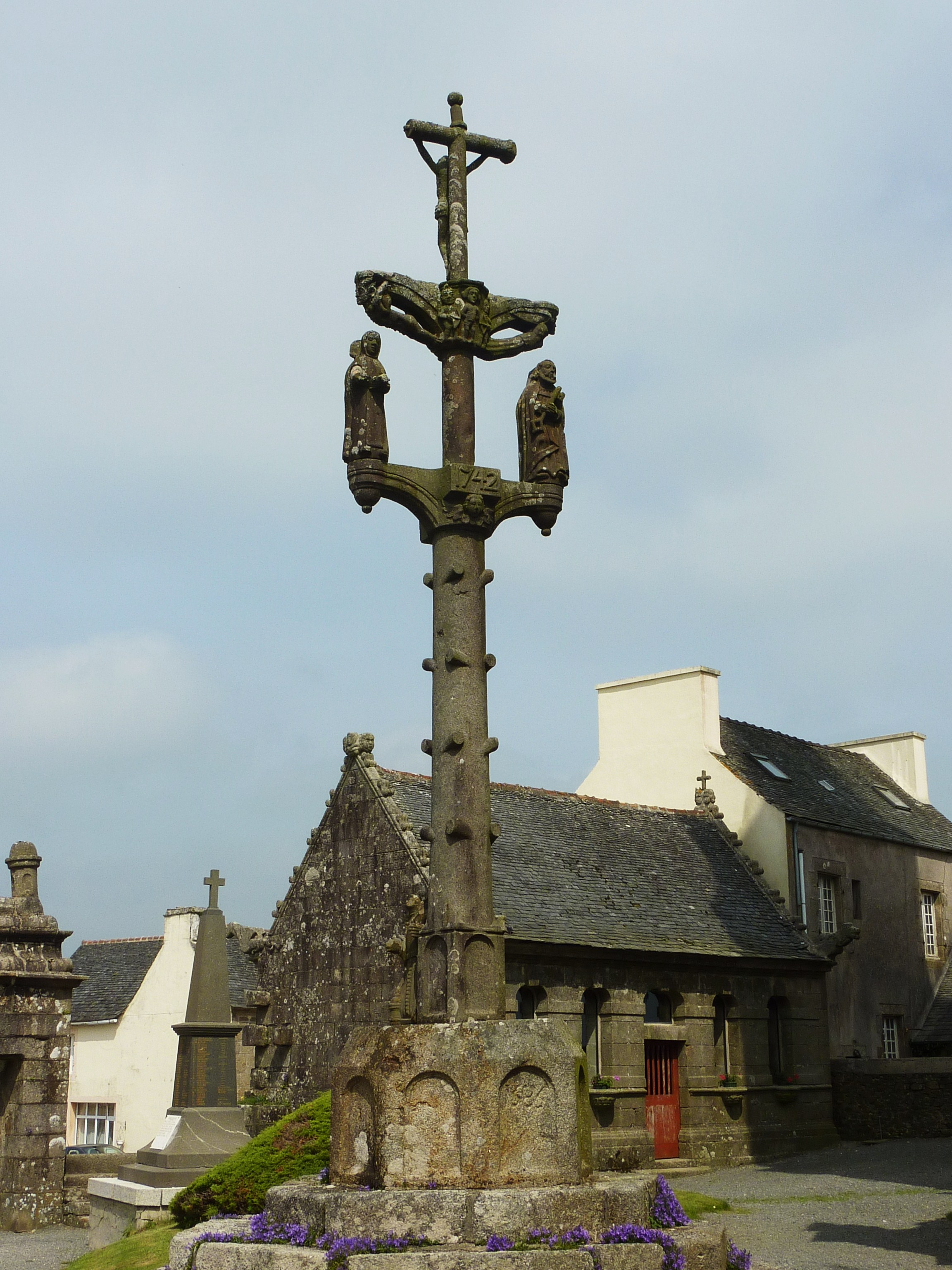 Commana : le calvaire de [1585] et [1742], et l'ossuaire de l'enclos paroissial.